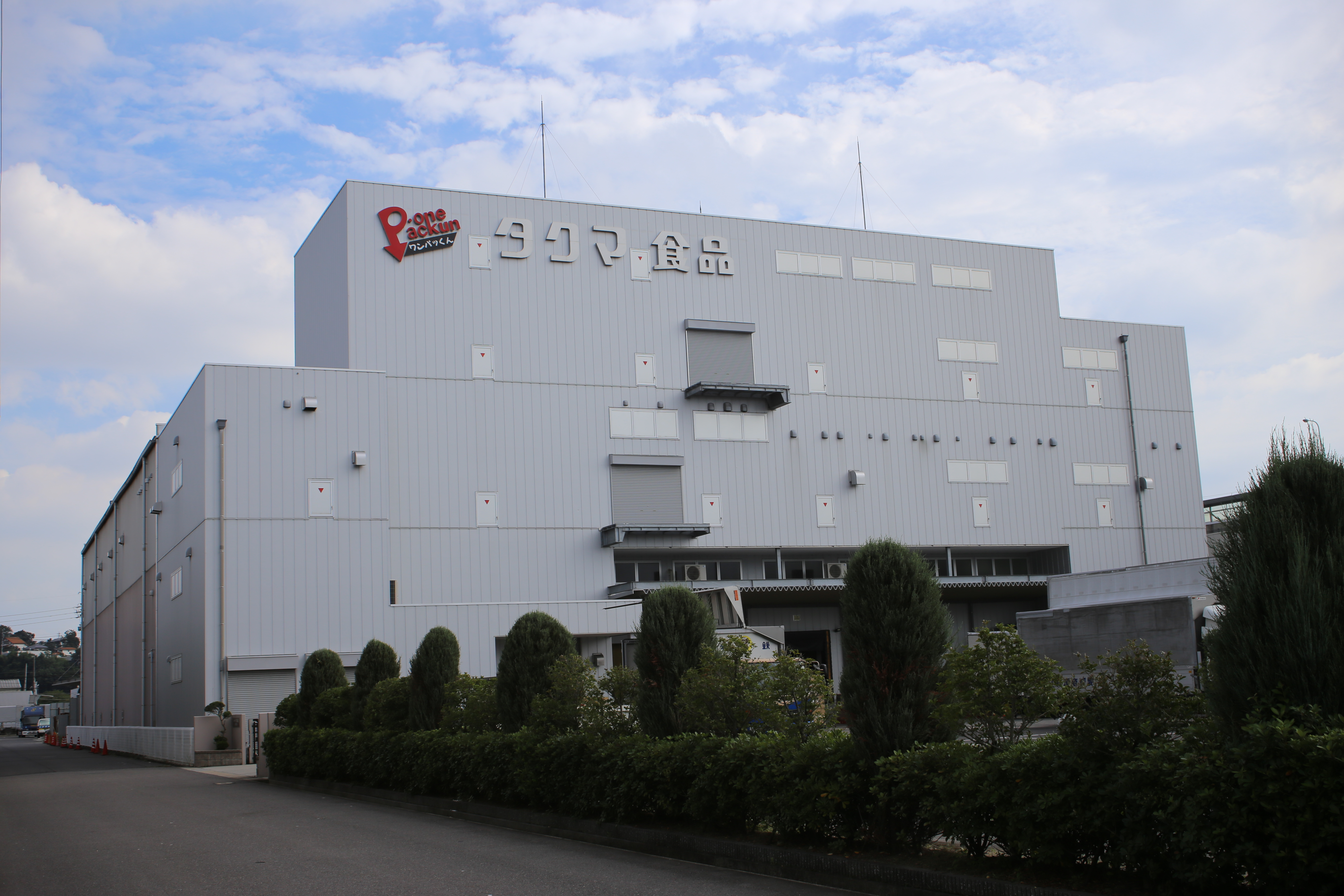 愛知県春日井市松河戸町のタクマ食品本社